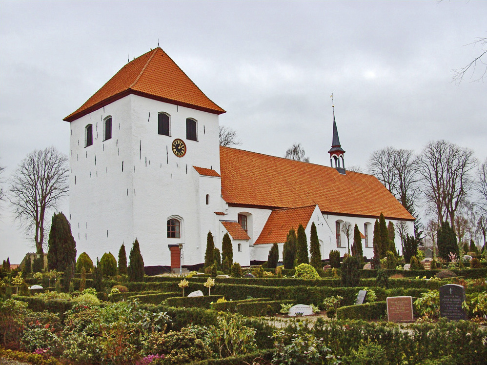 fra sydvest